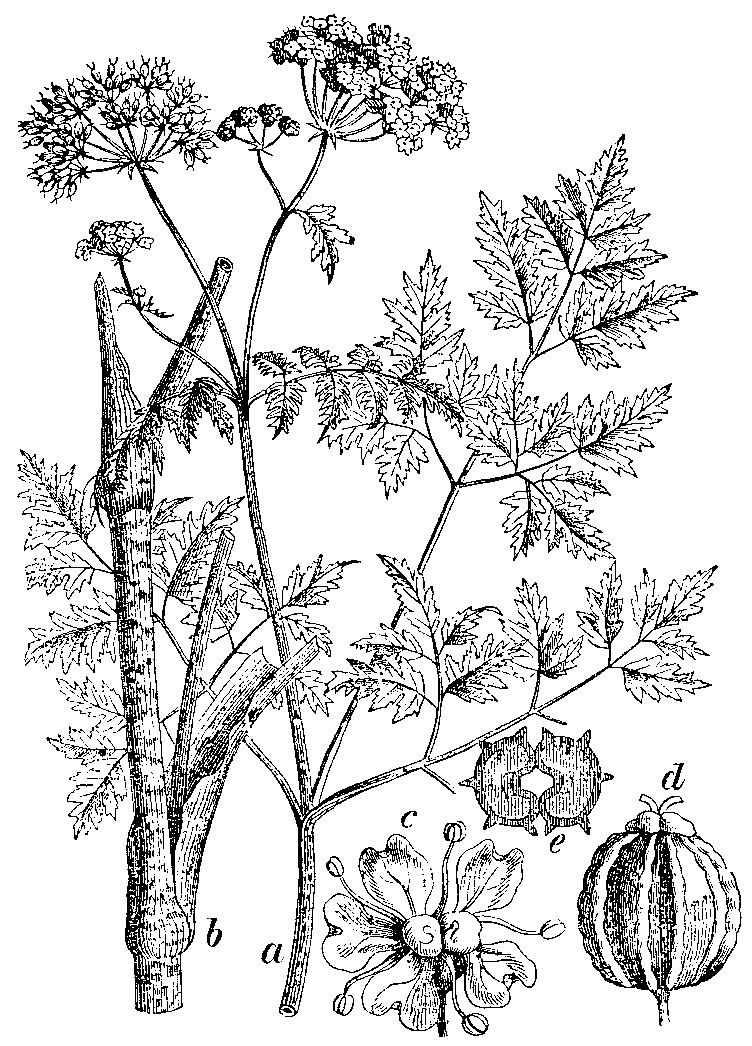 Slika 53. Pikasti mišjek. (Cónium maculátum.)